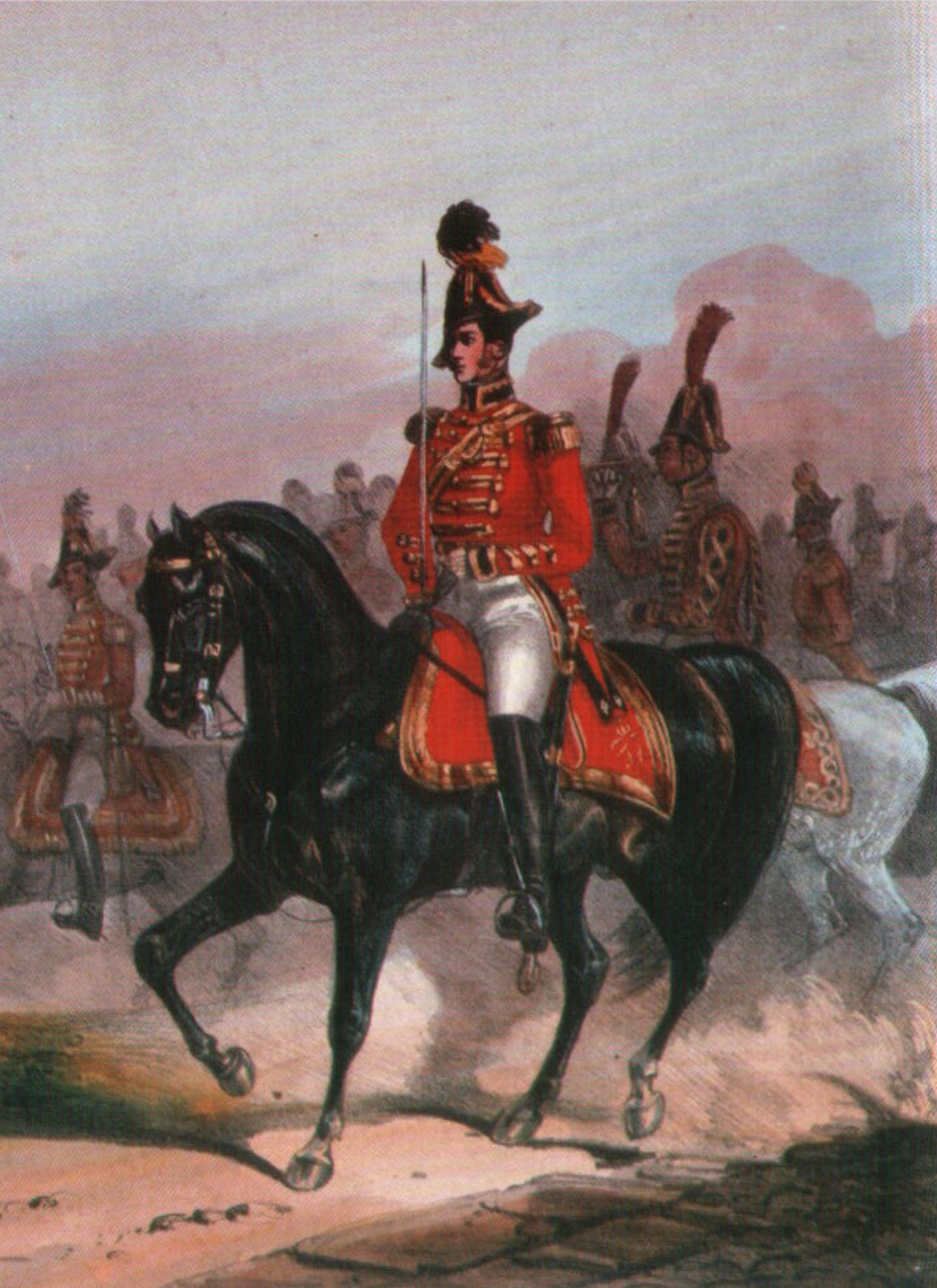 Arcièrenleibgarde (Austro-Hungaria) Mitte des 19.Jahrhunderts